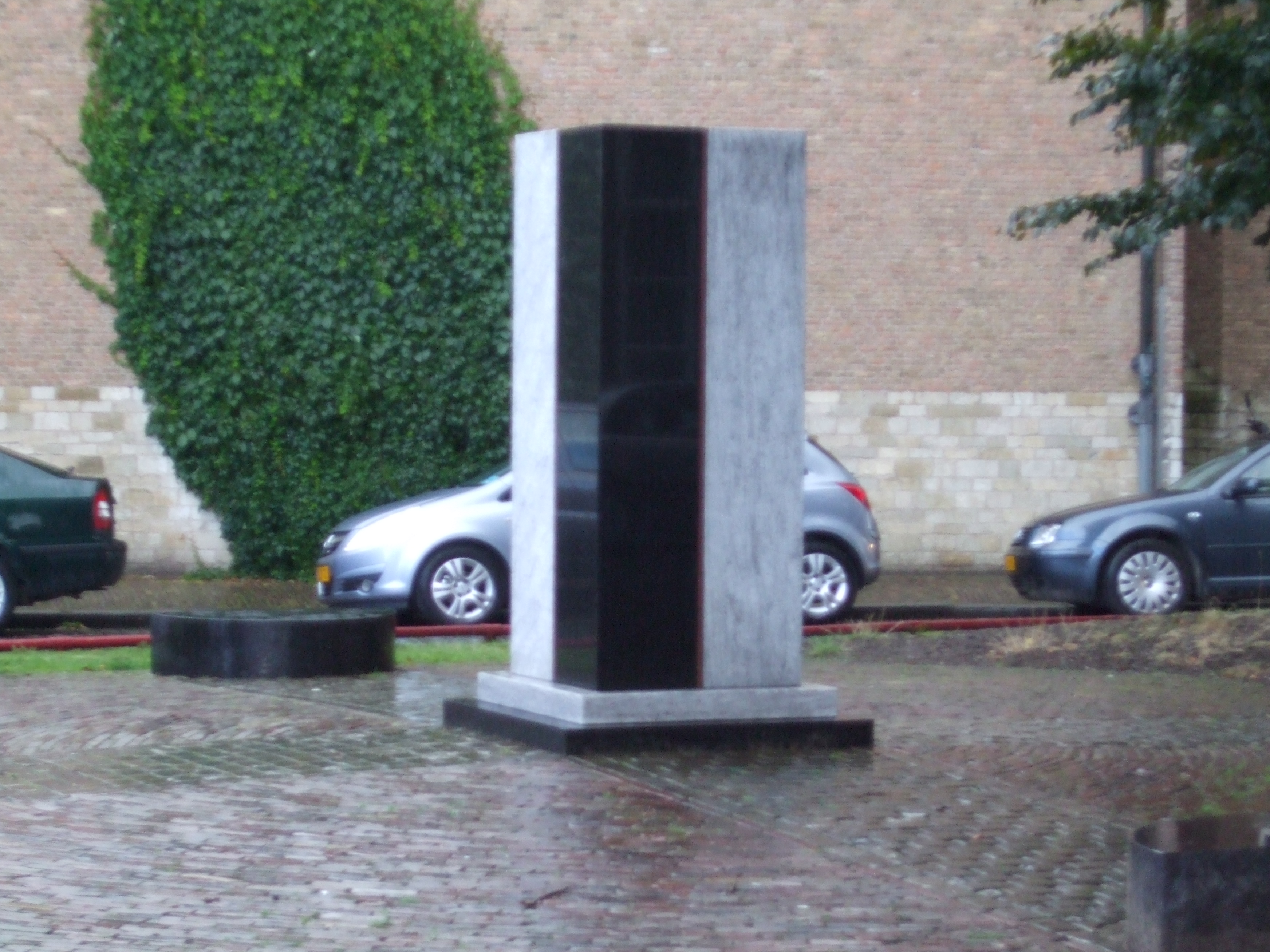 „van de voorouders - aan de kinderen - de gemeenschap - de toekomst“, Middelburg, Balans. Slavernijmonument door Hedi Bogaerts 2005.